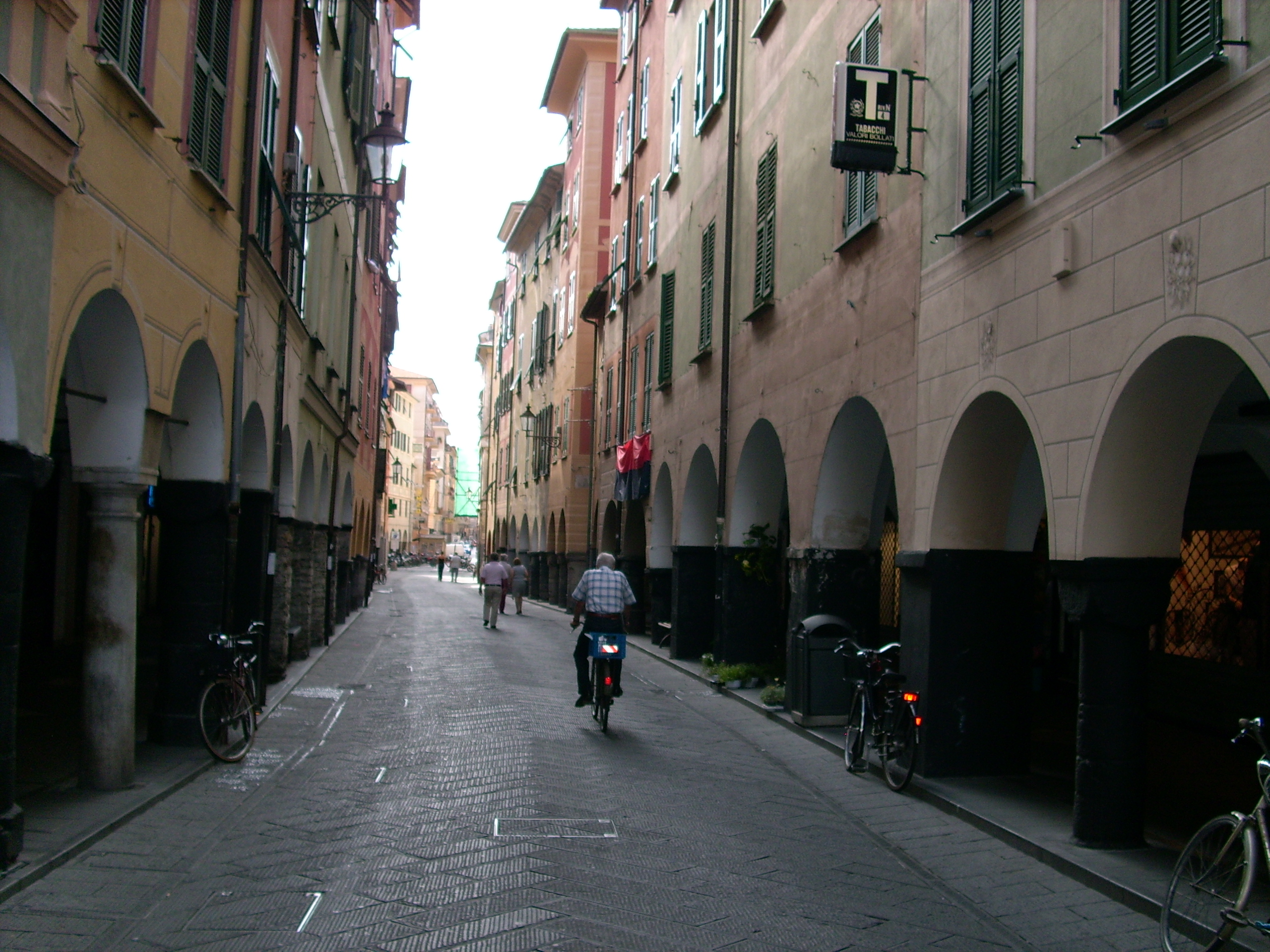 Via Vittorio Veneto, centro storico di Chiavari, Liguria, Italia